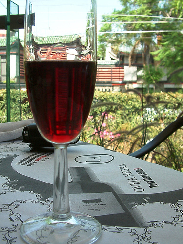 Copa de Fragolino, La O